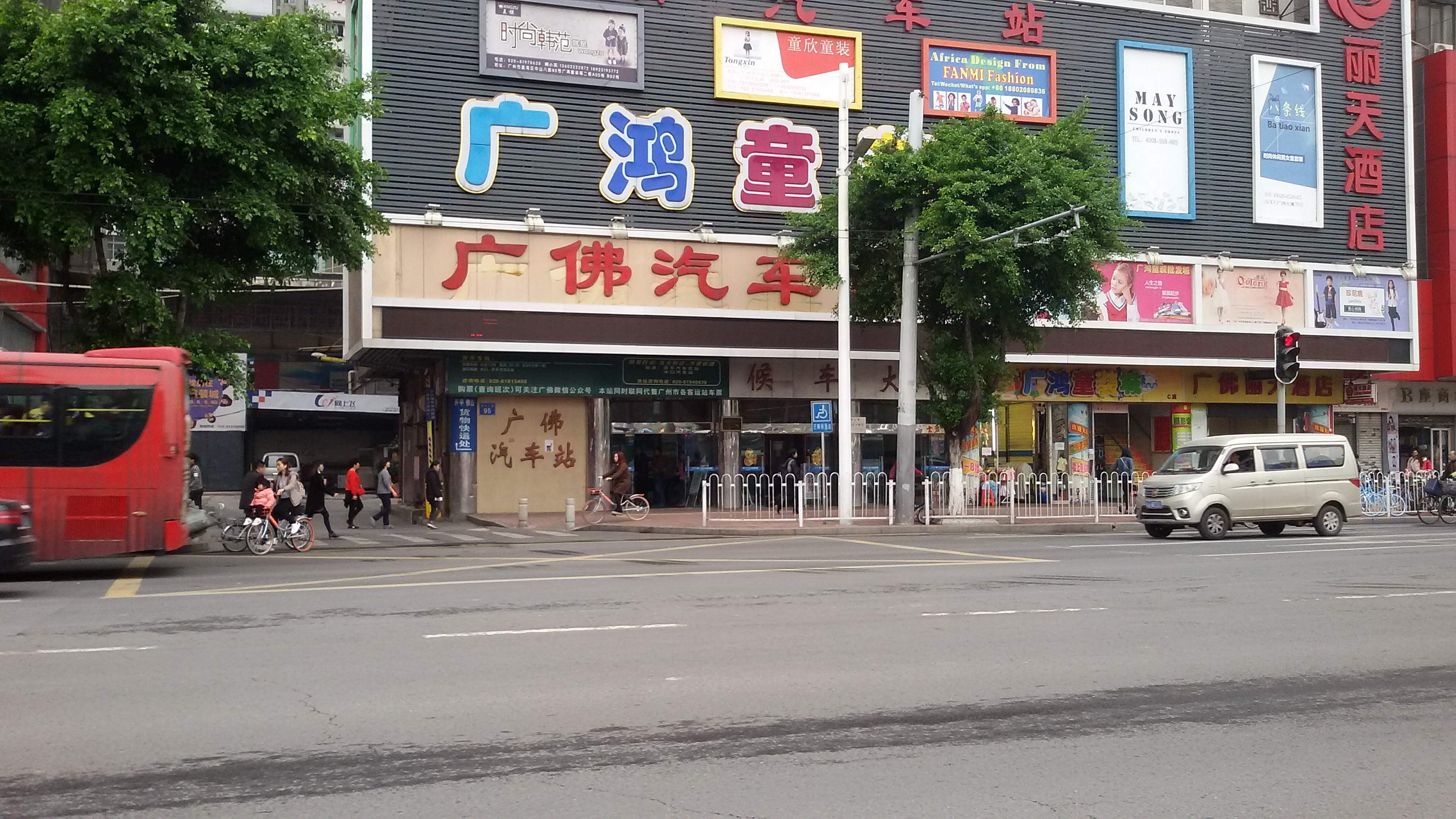 粵語: 廣佛汽車客運站